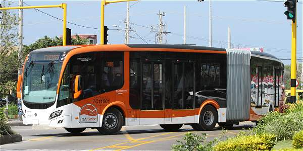 Un articulado de TransCaribe en cercania a la estacion chambachú